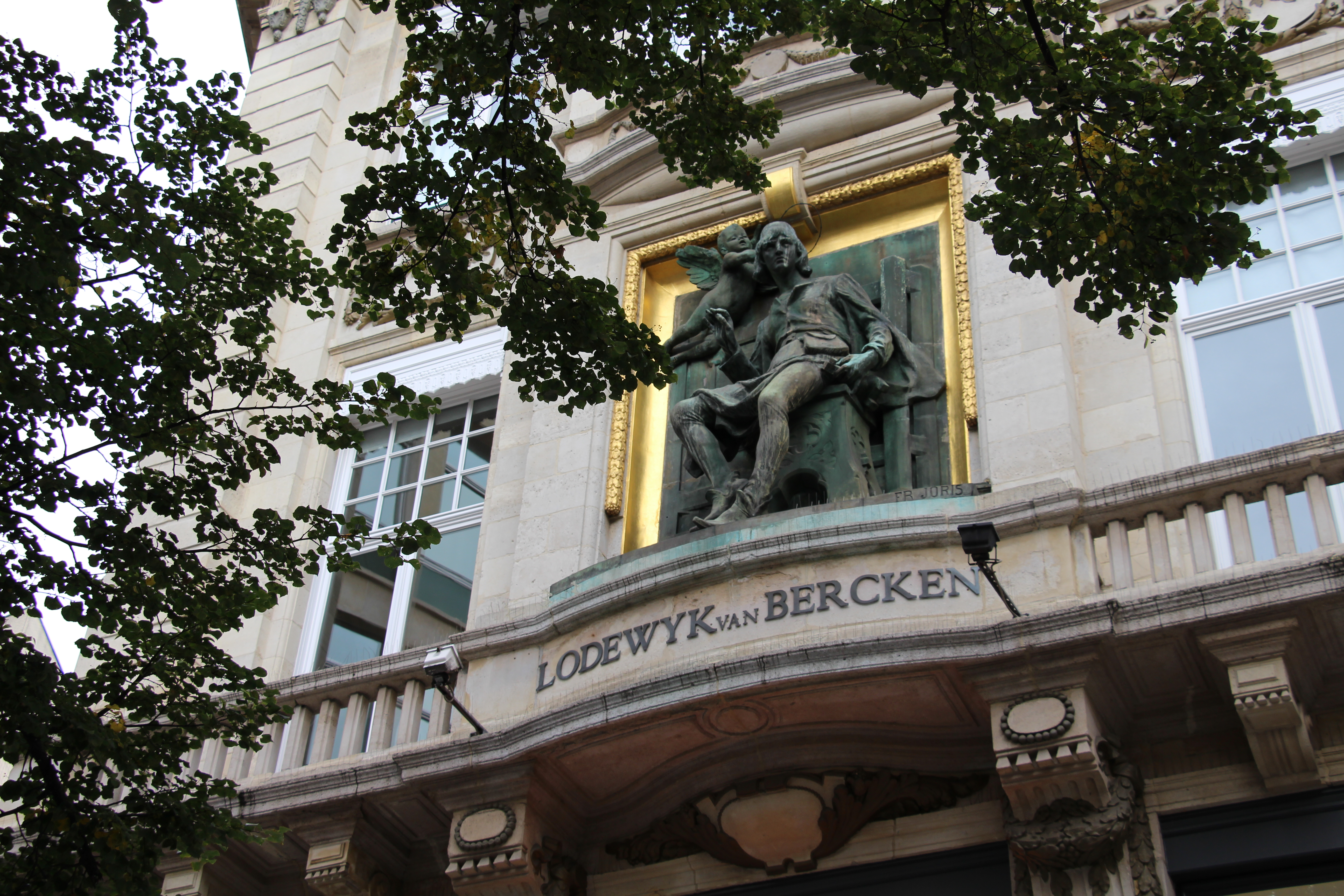 Leysstraat/Jezusstraat Eclecticism. Lodewijk van Bercken monument by Frans Joris in 1906